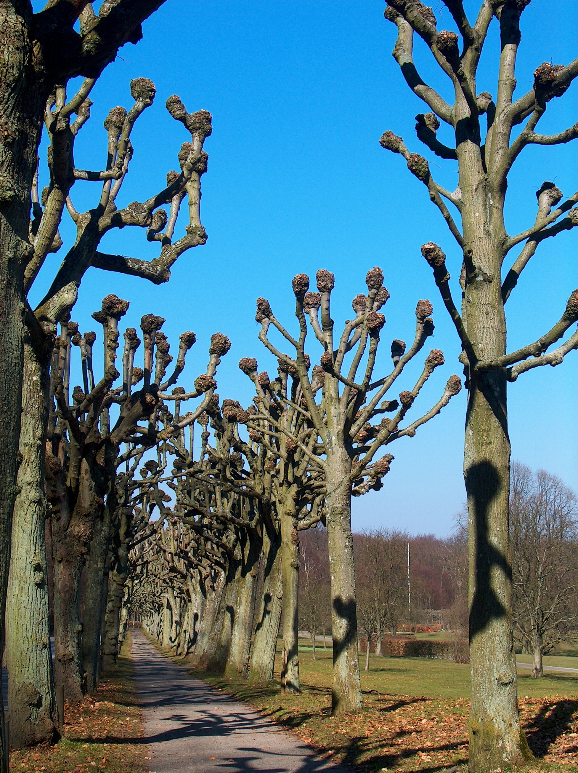 Stynede træer i Mindeparken i Århus